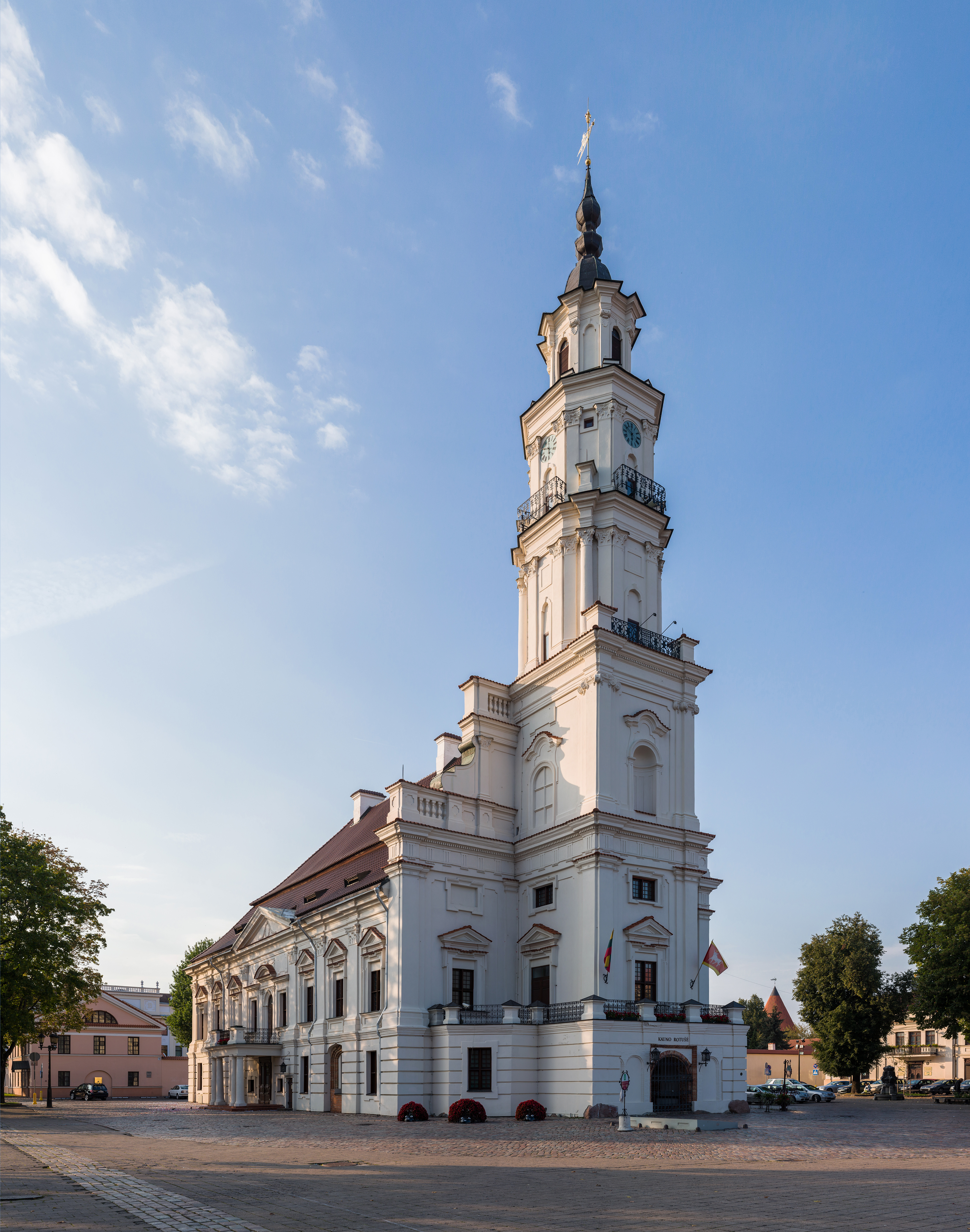 Kaunas Town Hall, Kaunas, Lithuania.